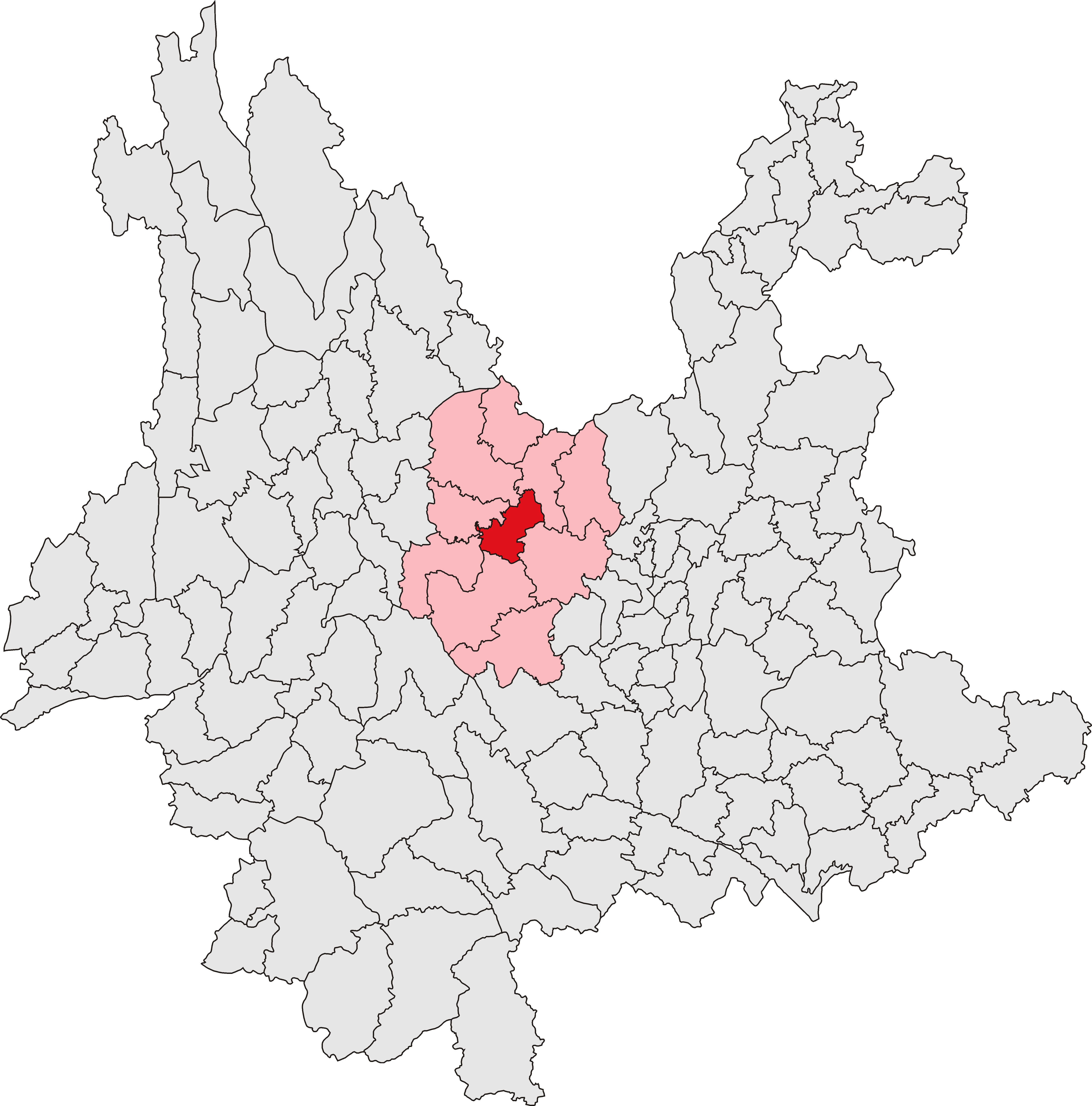 中文（中国大陆）: 牟定县位置图